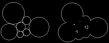 figuurtje sinteren zelfgemaakt, autoCAD GNU